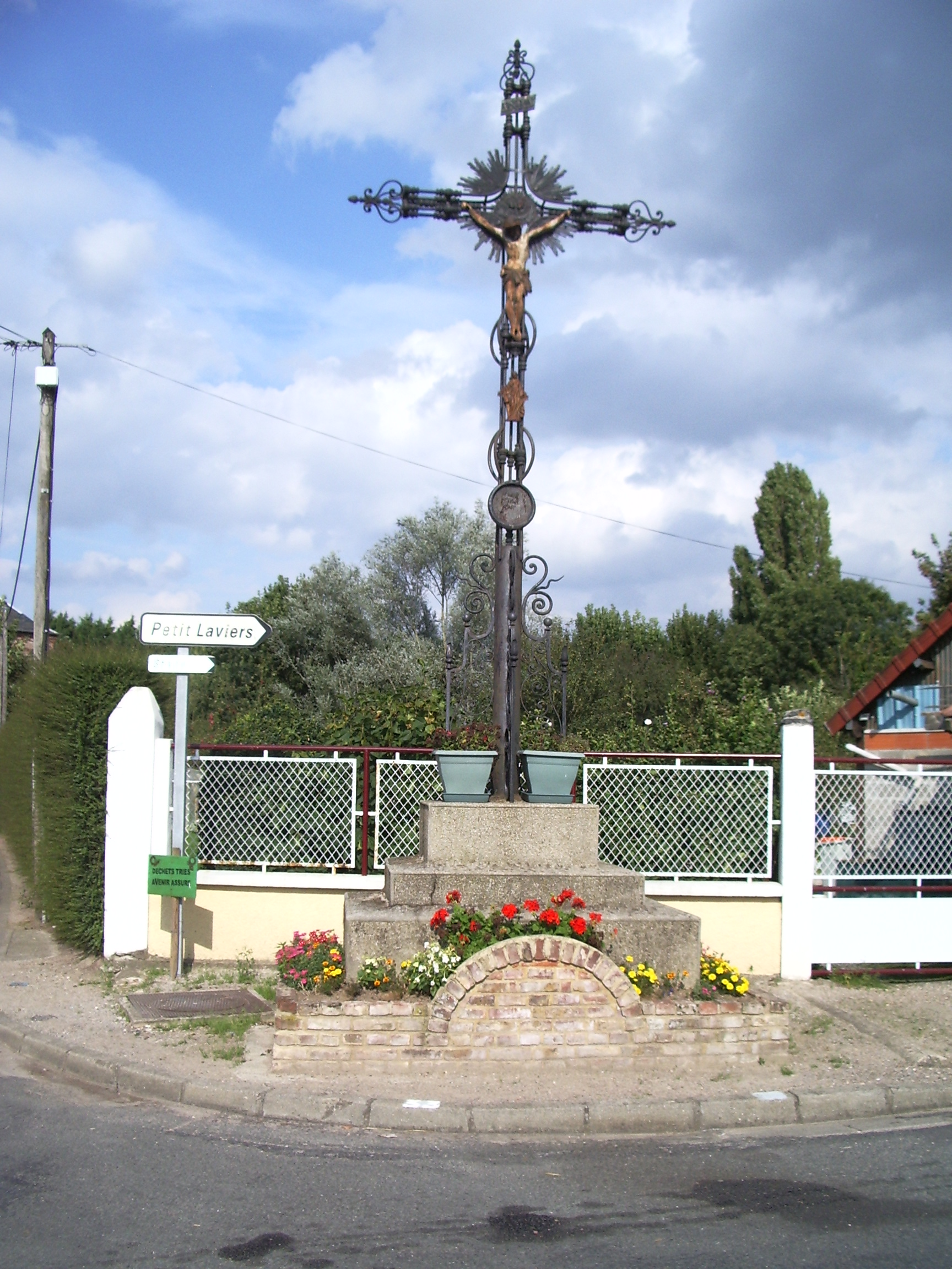 calvaire à Cambron